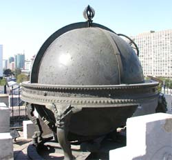 中文（中国大陆）: 北京古观象台之天体仪